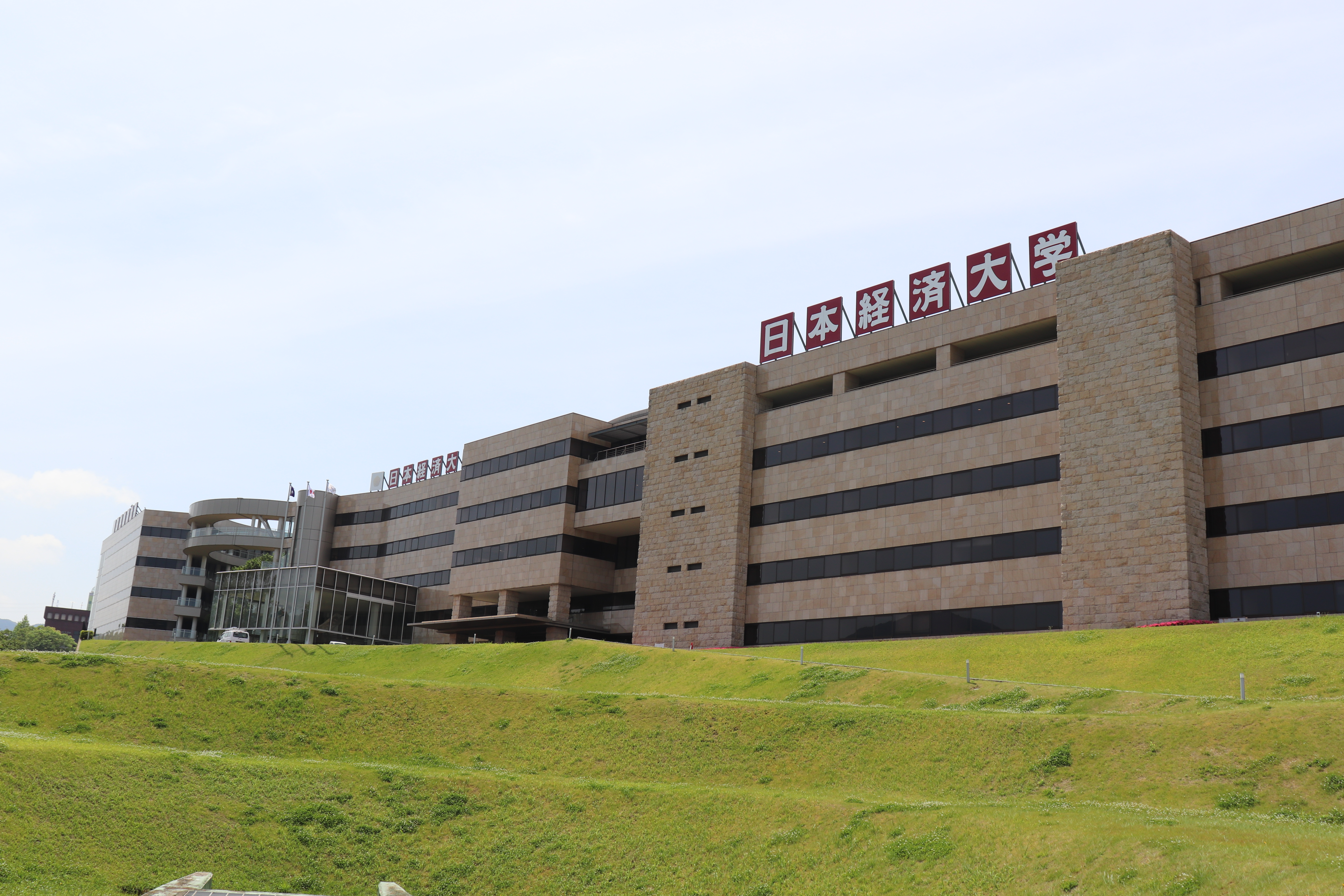 日本経済大学